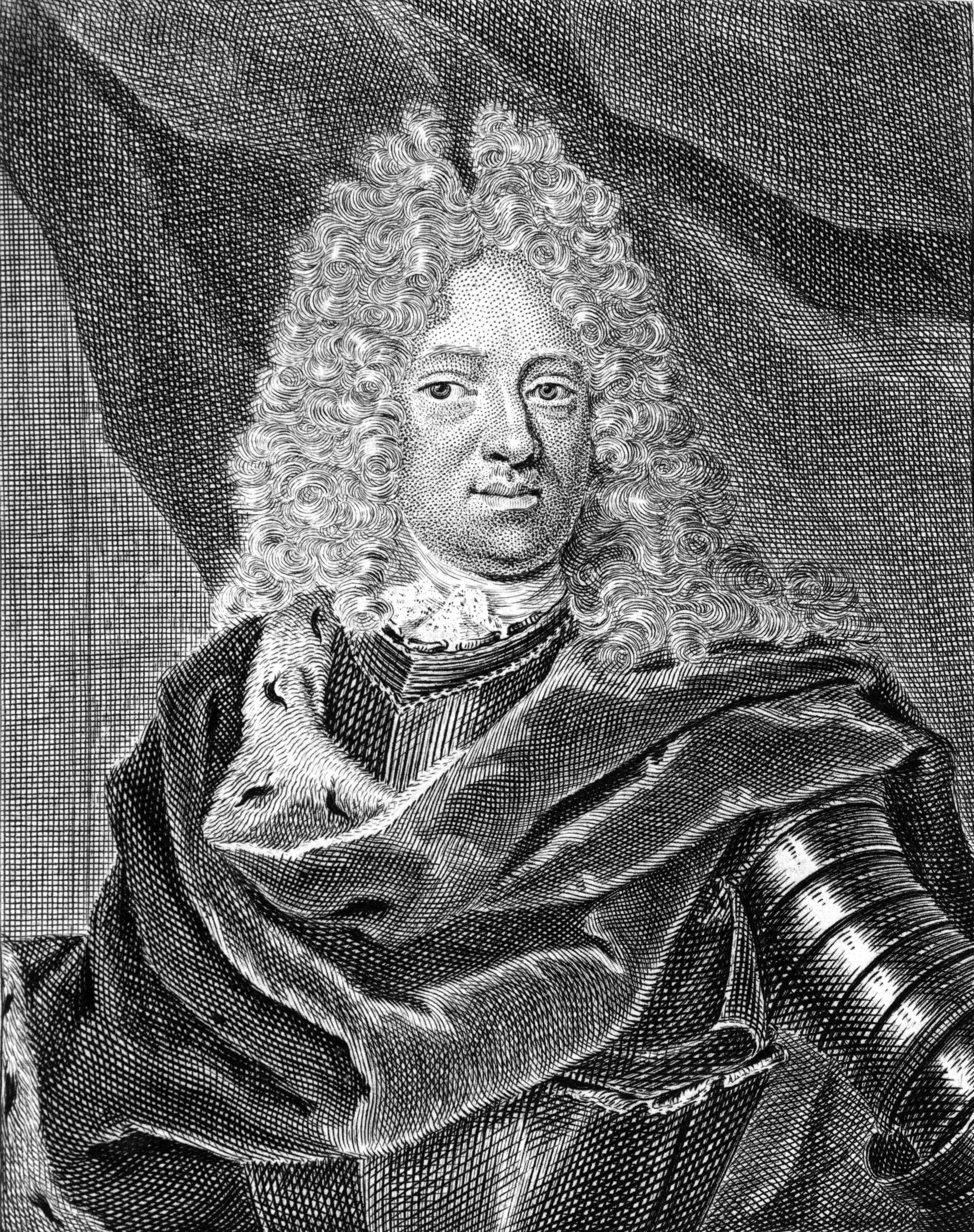 Depicted person: Christian von Sachsen-Weißenfels